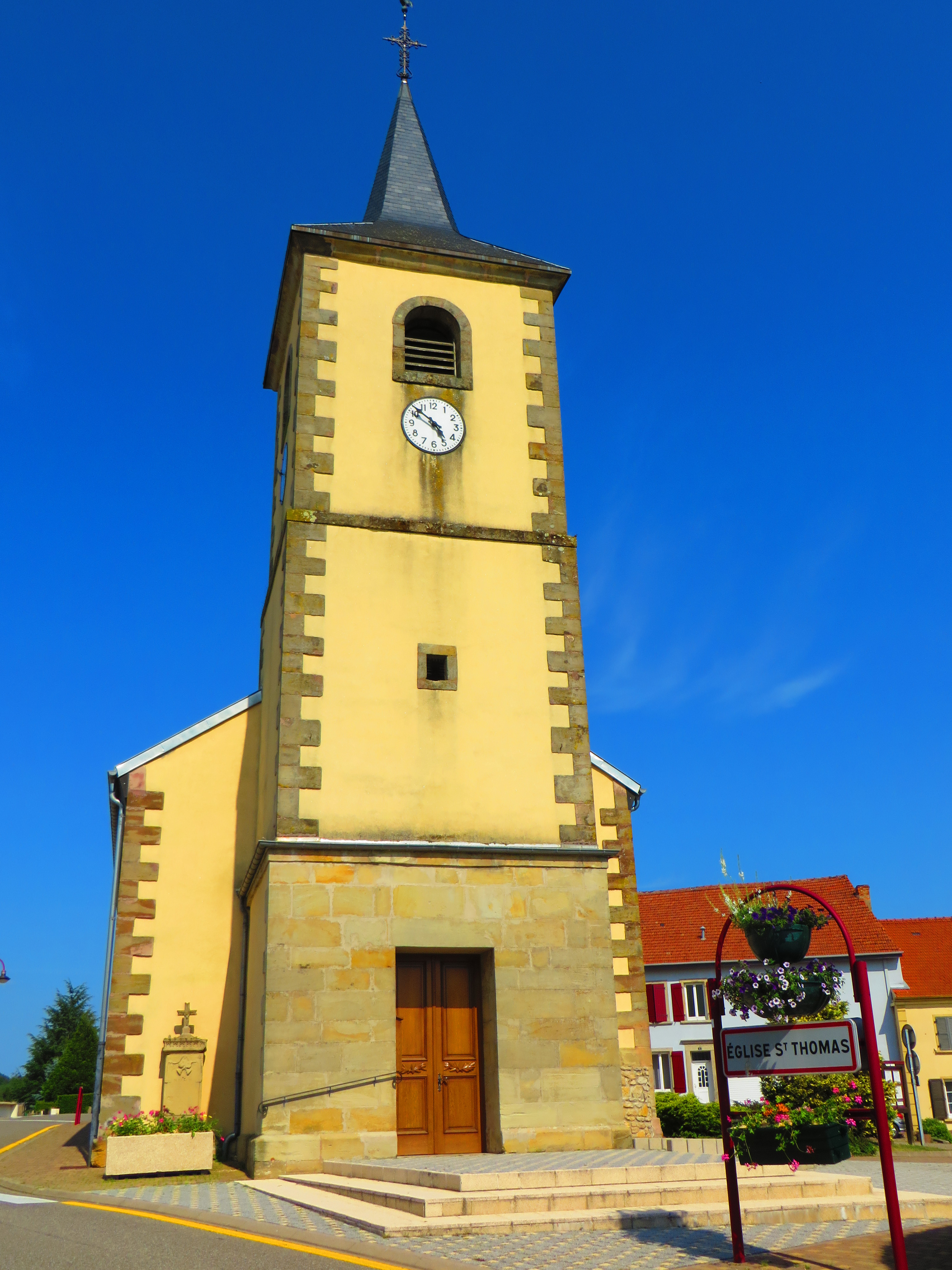 Macheren eglise